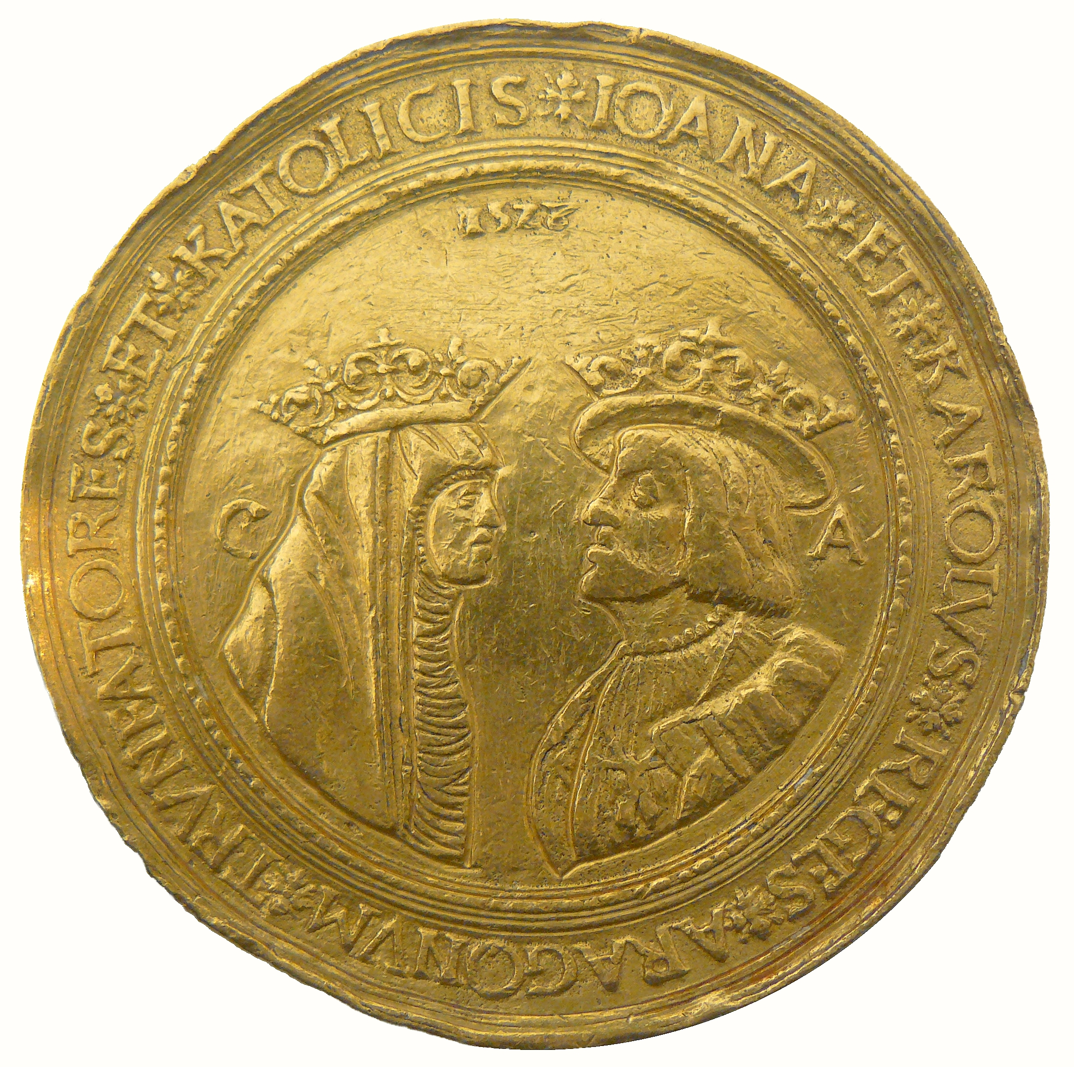 Pièce d'or de prestige du Royaume d'Aragon aux l'effigies de Jeanne 1re de Castille et de son fils Charles Quint. Frappée à Saragosse en 1528, poids 349,32 g diamètre 84 mm. Unicum unique exemplaire connu, cabinet des médailles et antiques de la bibliothèque nationale de France. INV : Espagne 33/44.